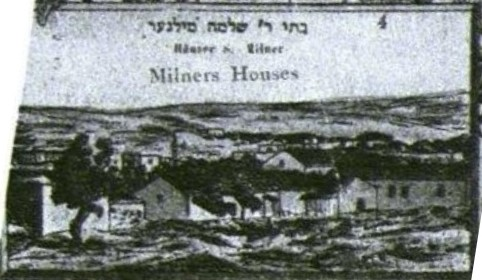 פרט מתוך גלויה המציגה שכונות בירושלים